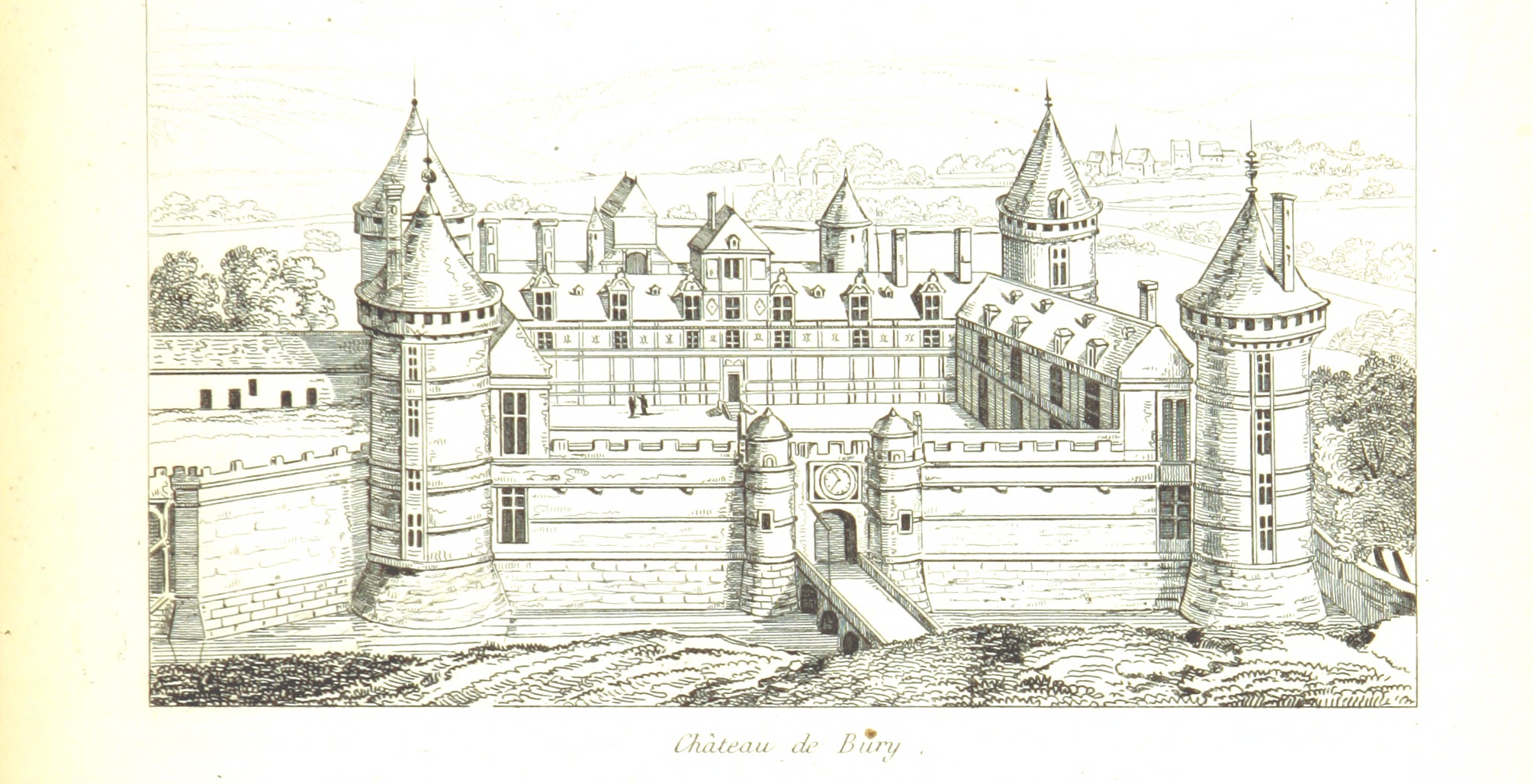 Le château de Bury, tel que représenté dans la "France historique et monumentale" de Jean-Abel Hugo (1839)